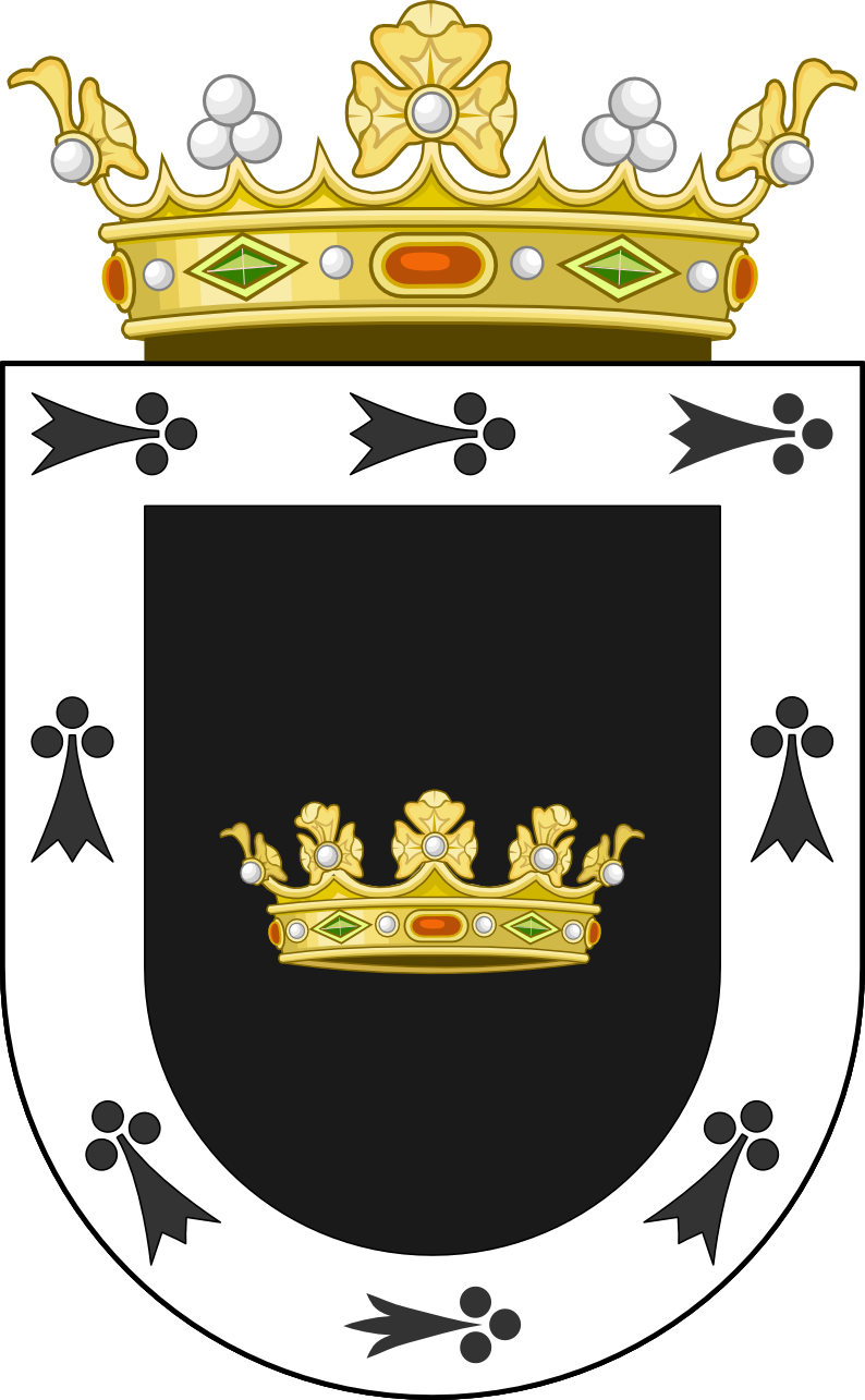 Escudo del Marquesado de Bellamar.